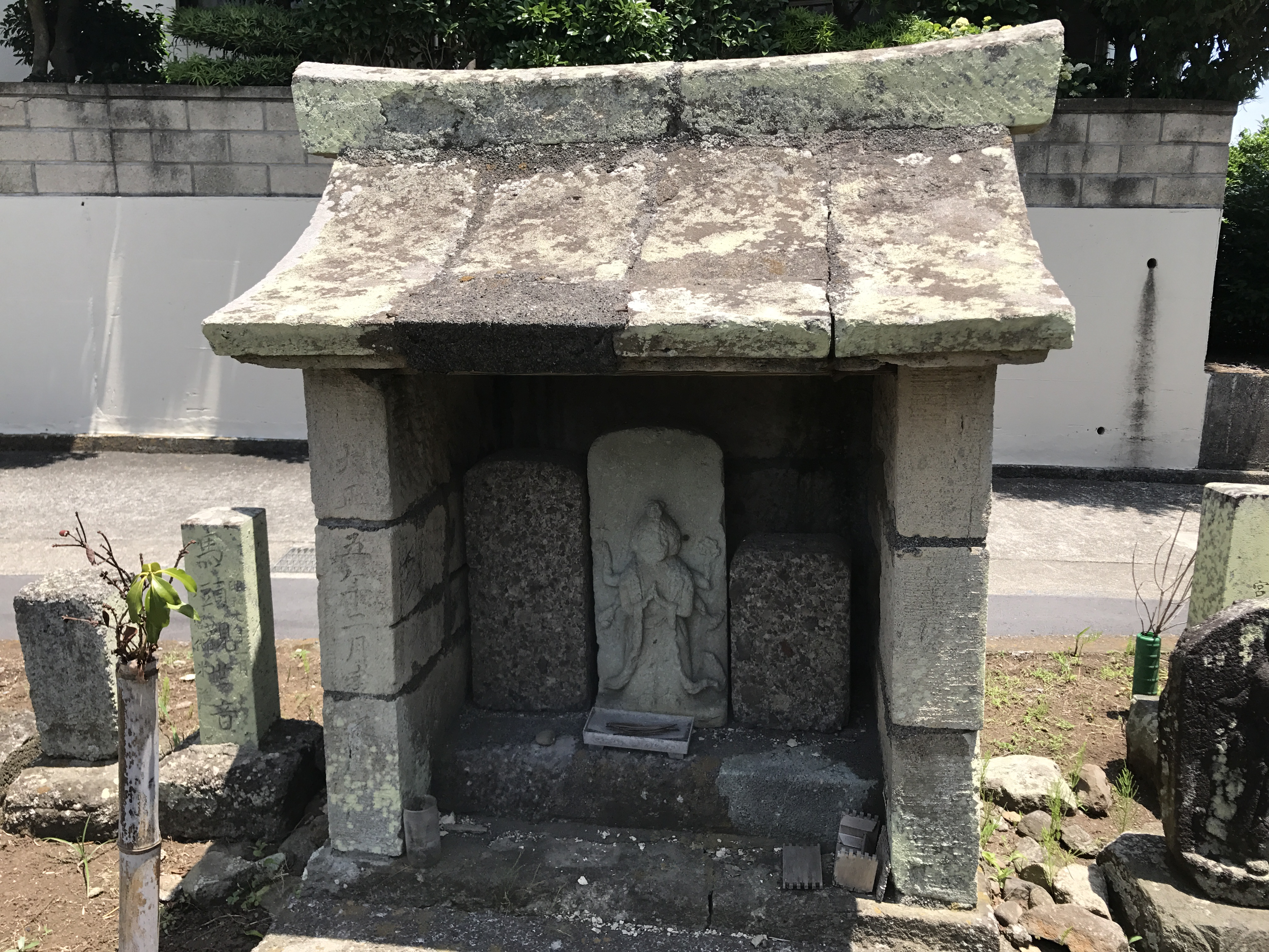 路傍の馬頭観音像